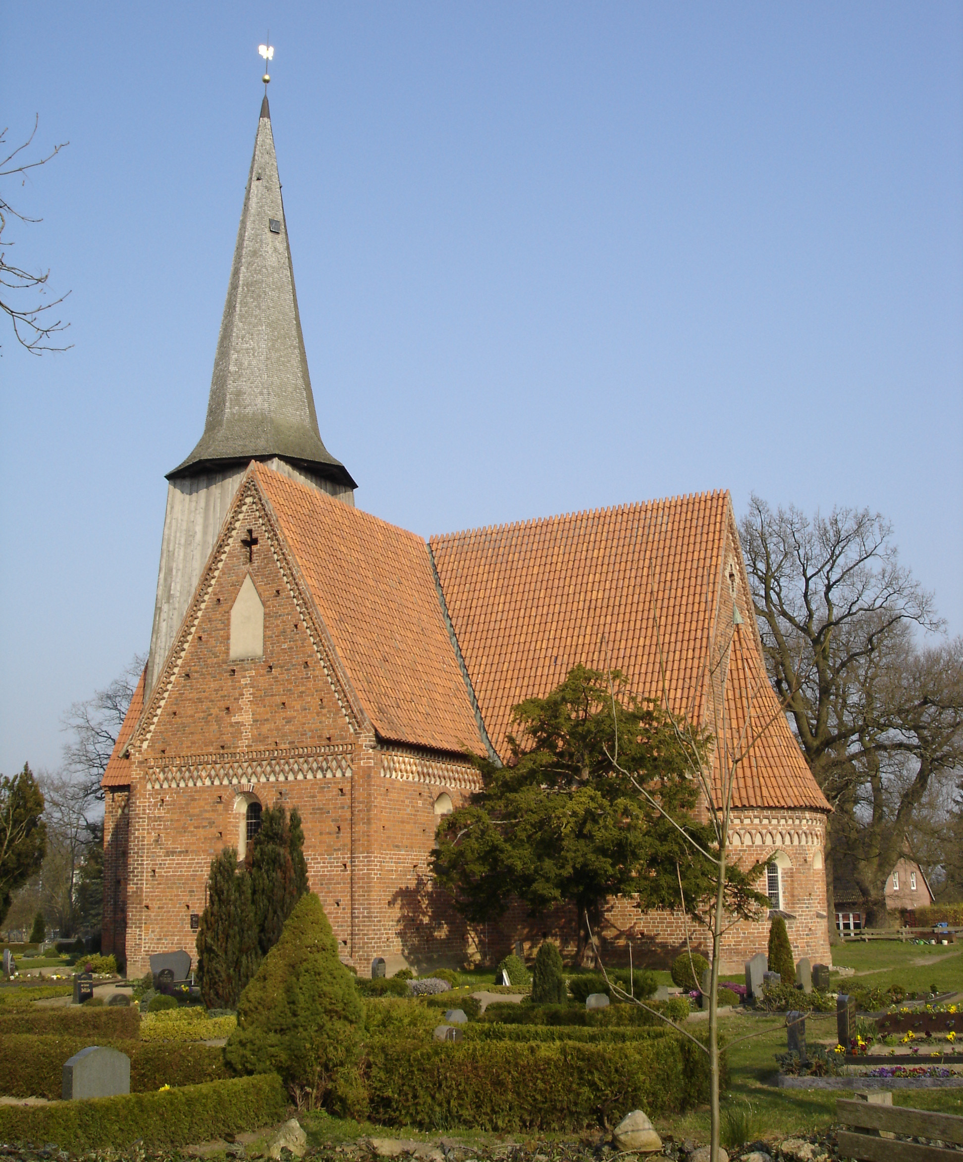 Kirche in Vietlübbe / Church in Vietlübbe (Mecklenburg-Western Pomerania)